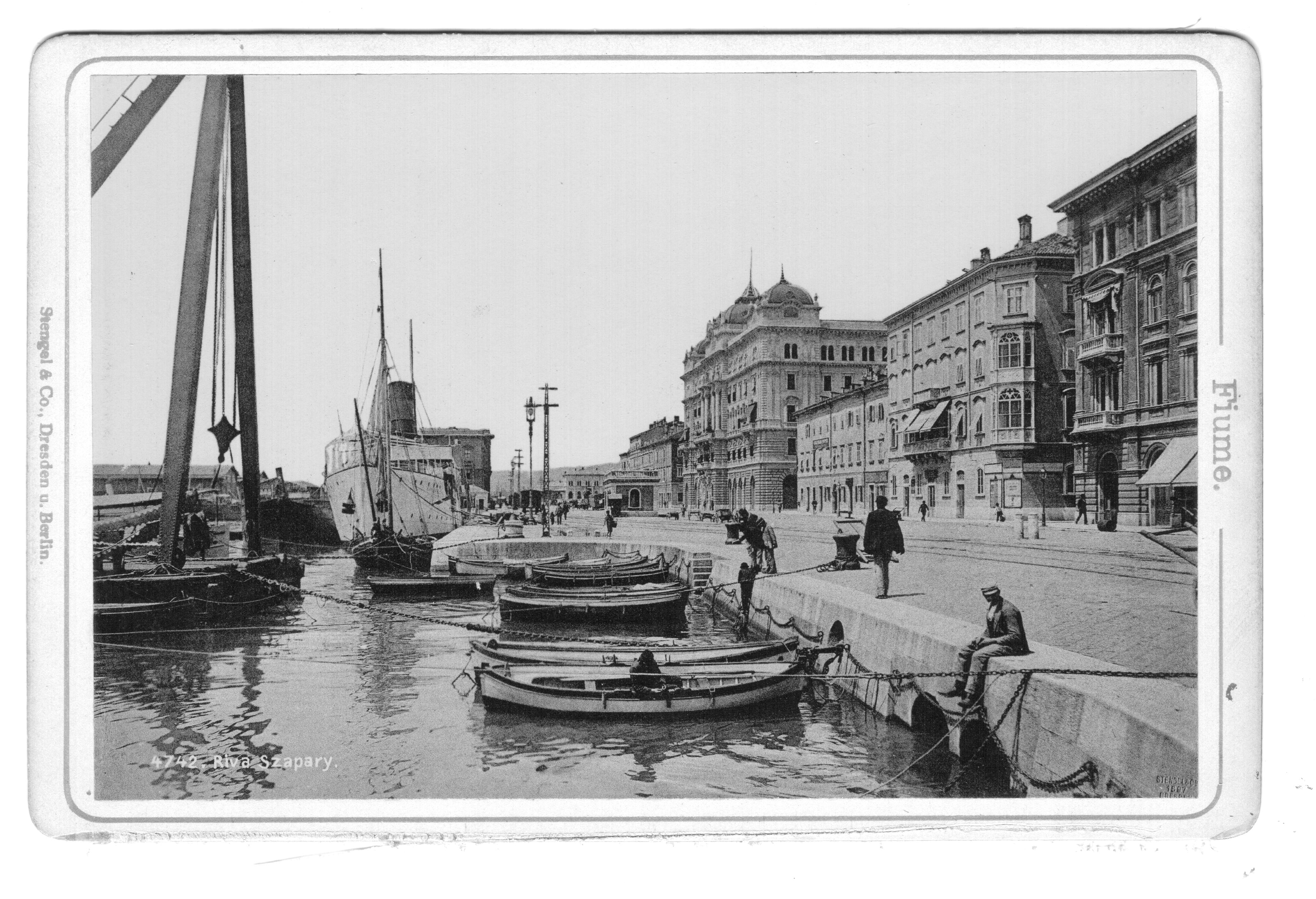 Magyar Királyság, Fiume. Edoardo Schambik fényképész. PD-old. A FIUME című fényképalbum 12, fehér vászonnal összefűzött fényképe közül az utolsó fénykép hátoldalára ragasztott kék-fehér bélyeg szövege a következő: EDOARDO SCHAMBIK FIUME Corso No 13. ©© Megjelent Creative Commons alatt a Metapolisz sorozatban. A Metapolisz sorozat valamennyi képe és filmje Creative Commons alatti valamint kereskedelmi - for profit - célra is felhasználható. Ajánlott hivatkozás: Derzsi Elekes Andor: Metapolisz DVD line ©© Published under Creative Commons in the Metapolisz DVD line. All of the photos and vids in the Metapolisz DVD line are under Creative Commons and can be used even for commercial – for profit – purposes. Recommended Citation Derzsi Elekes Andor: Metapolisz DVD line